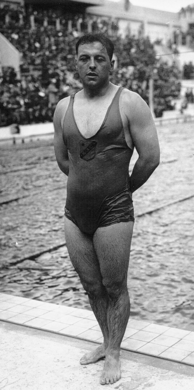 Tourelles, championnats de France de natation : Vallerey (portrait) gagnant du 200 m brasse : [photographie de presse] / Agence Meurisse